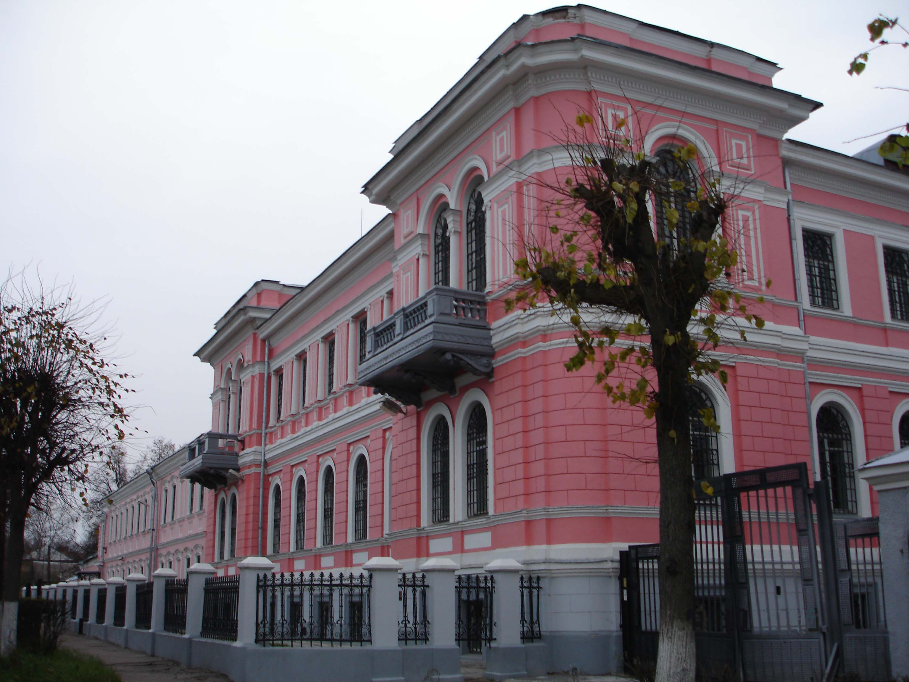 Здание Серпуховского историко-художественного музея